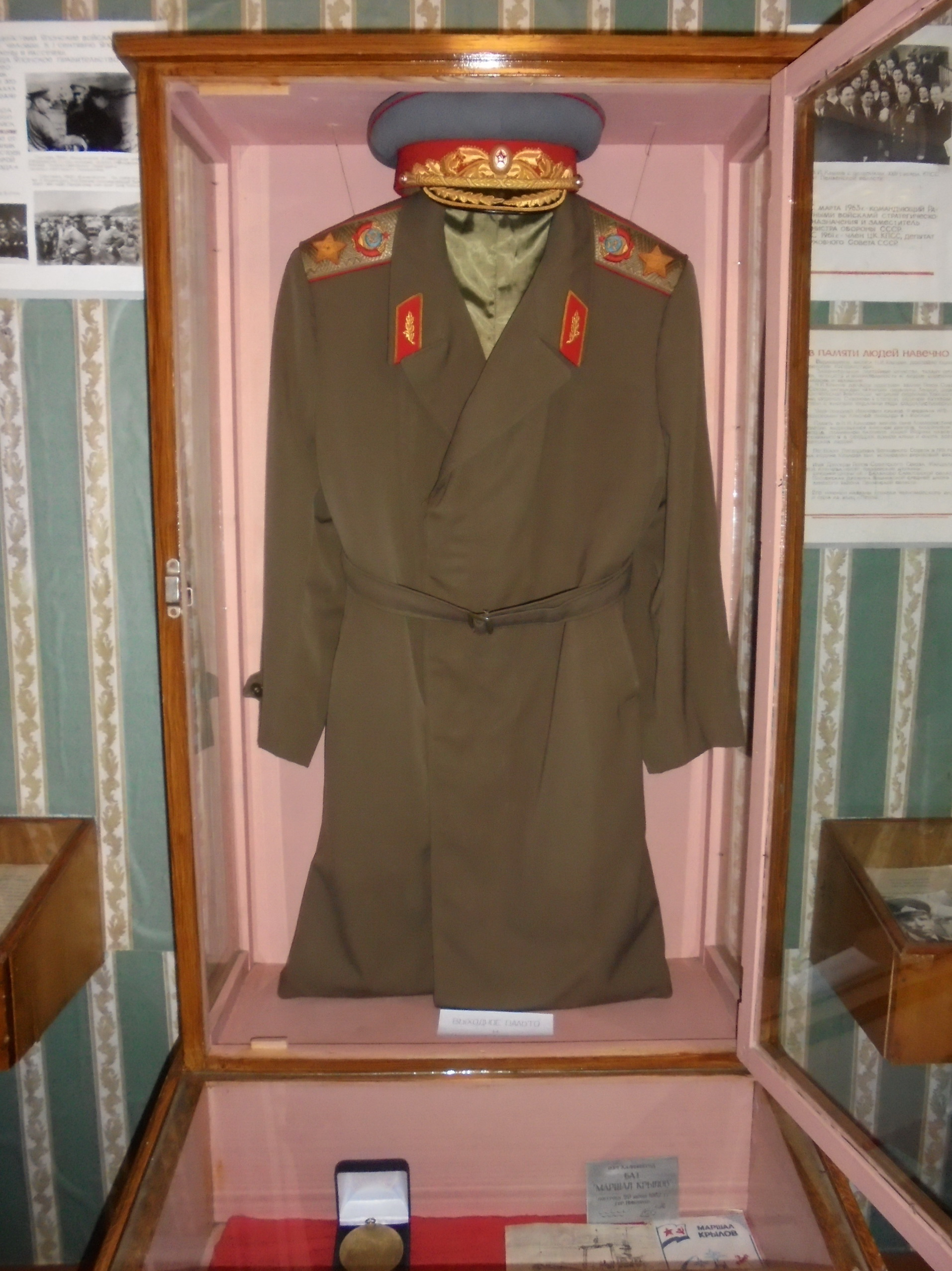 Выходное пальто и парадная фуражка Маршала Н.И. Крылова (часть постоянной экспозиции Историко-краеведческого музея имени Н. И. Крылова в селе Вишнёвое Тамалинского р-на Пензенской области)